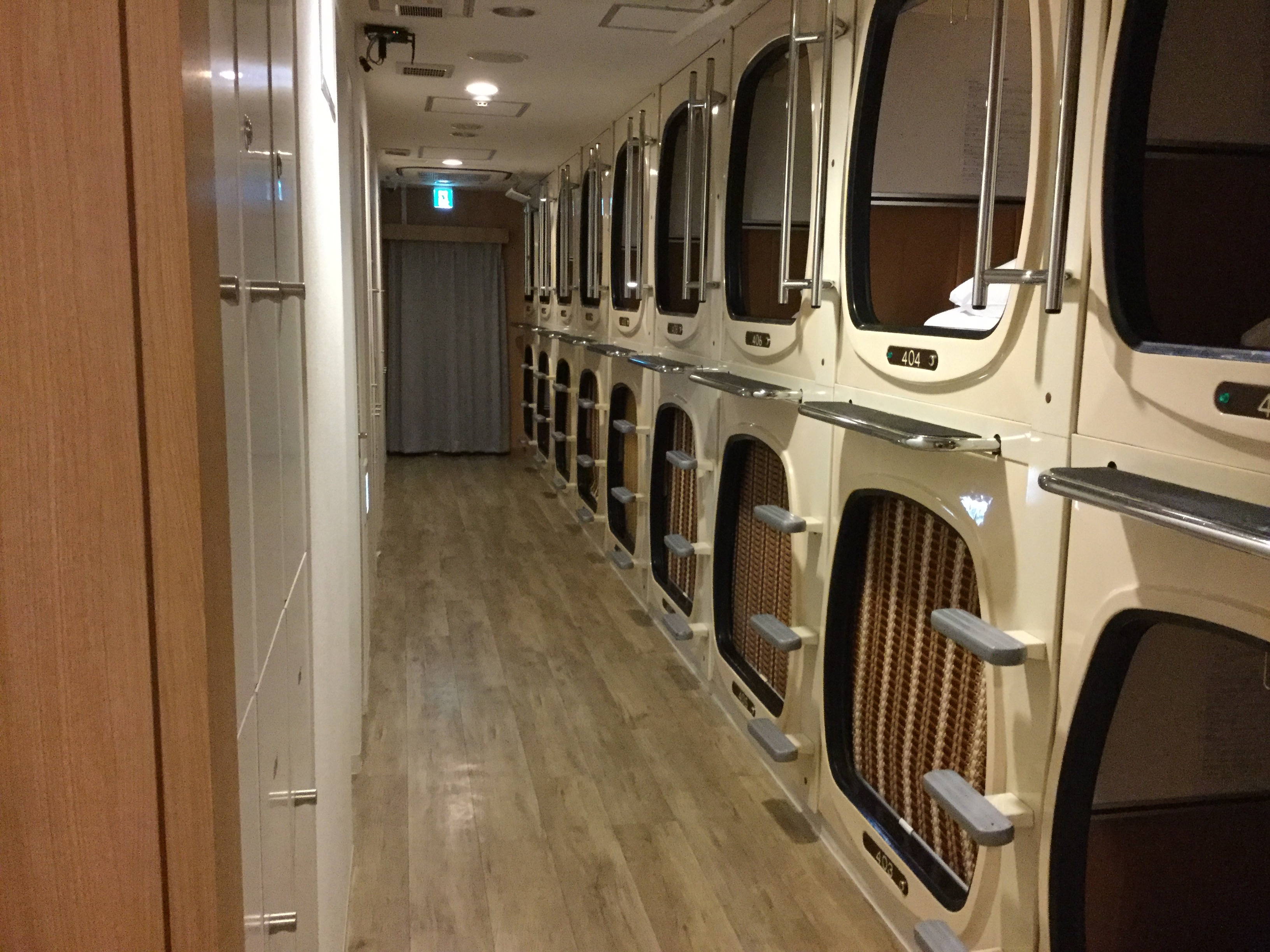 tokyo_20171221203604